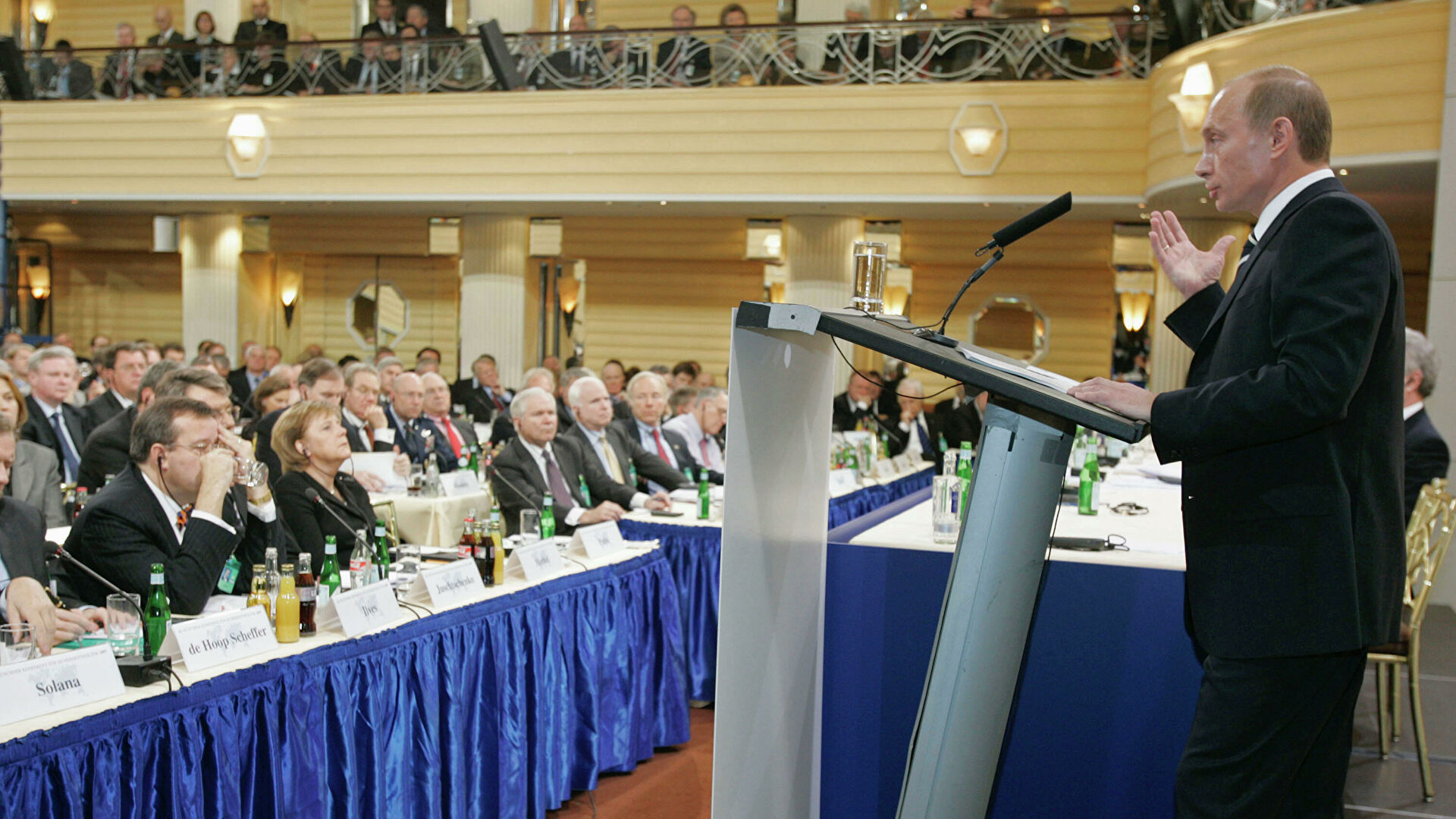 Выступление Путина в Мюнхене